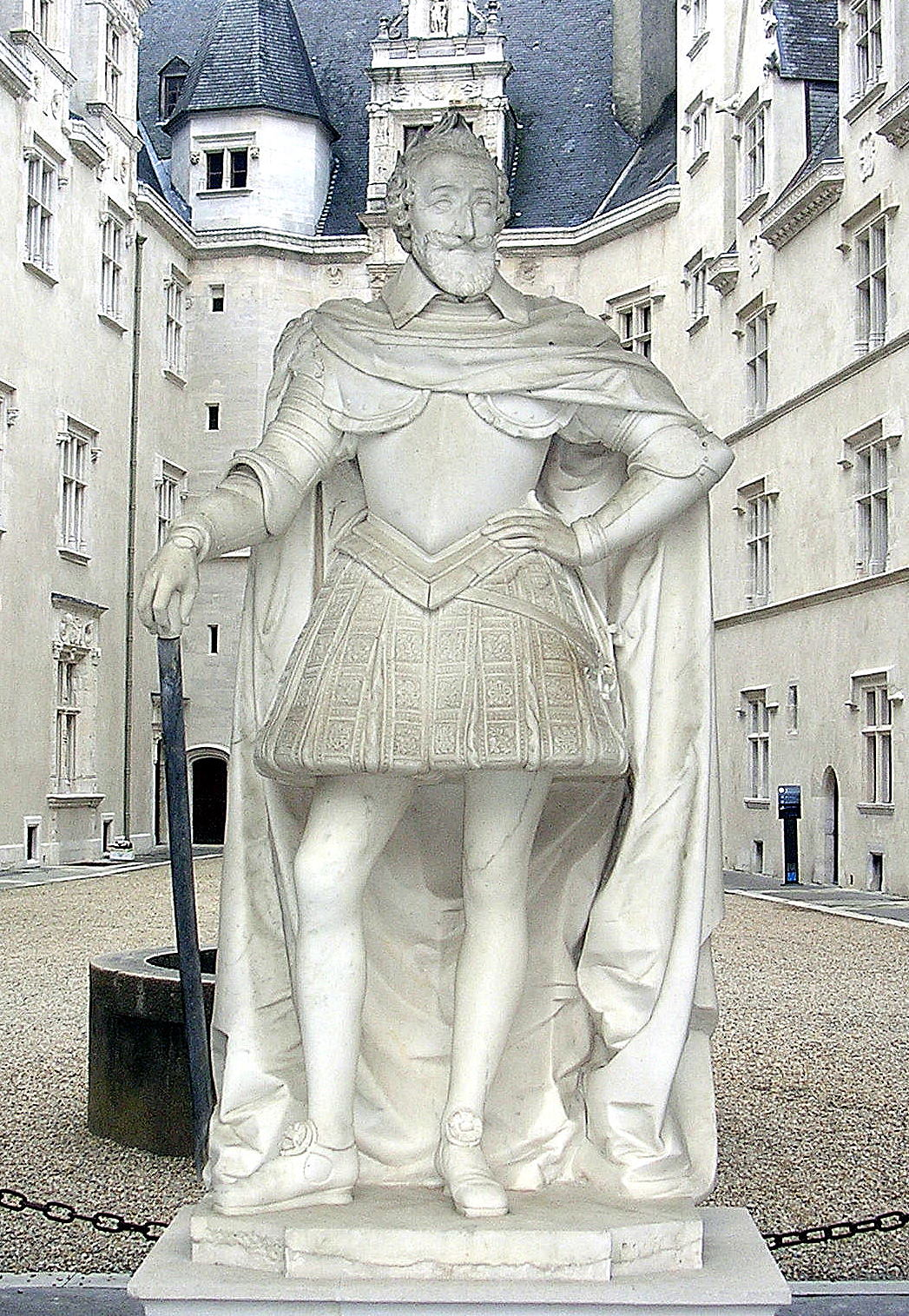 Statue d'Henri IV devant le château de Pau